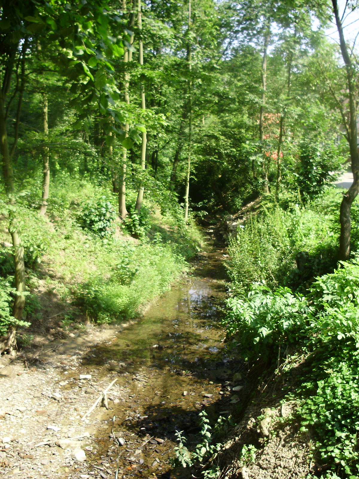 Kletenský potok - Suchdol nad Odrou